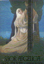 Póster de la obra de Piccini "Suor Angelica"